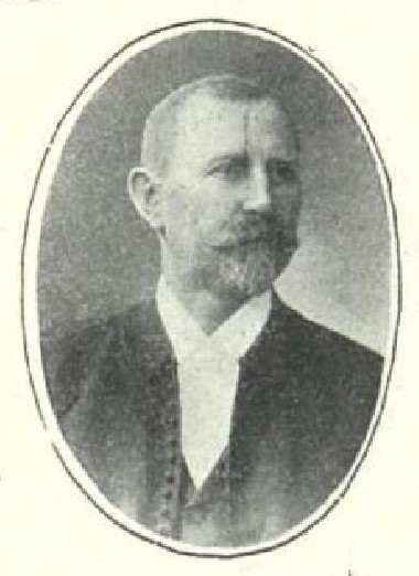 Jan Náprstek (1858-1935), rakouský politik české národnosti